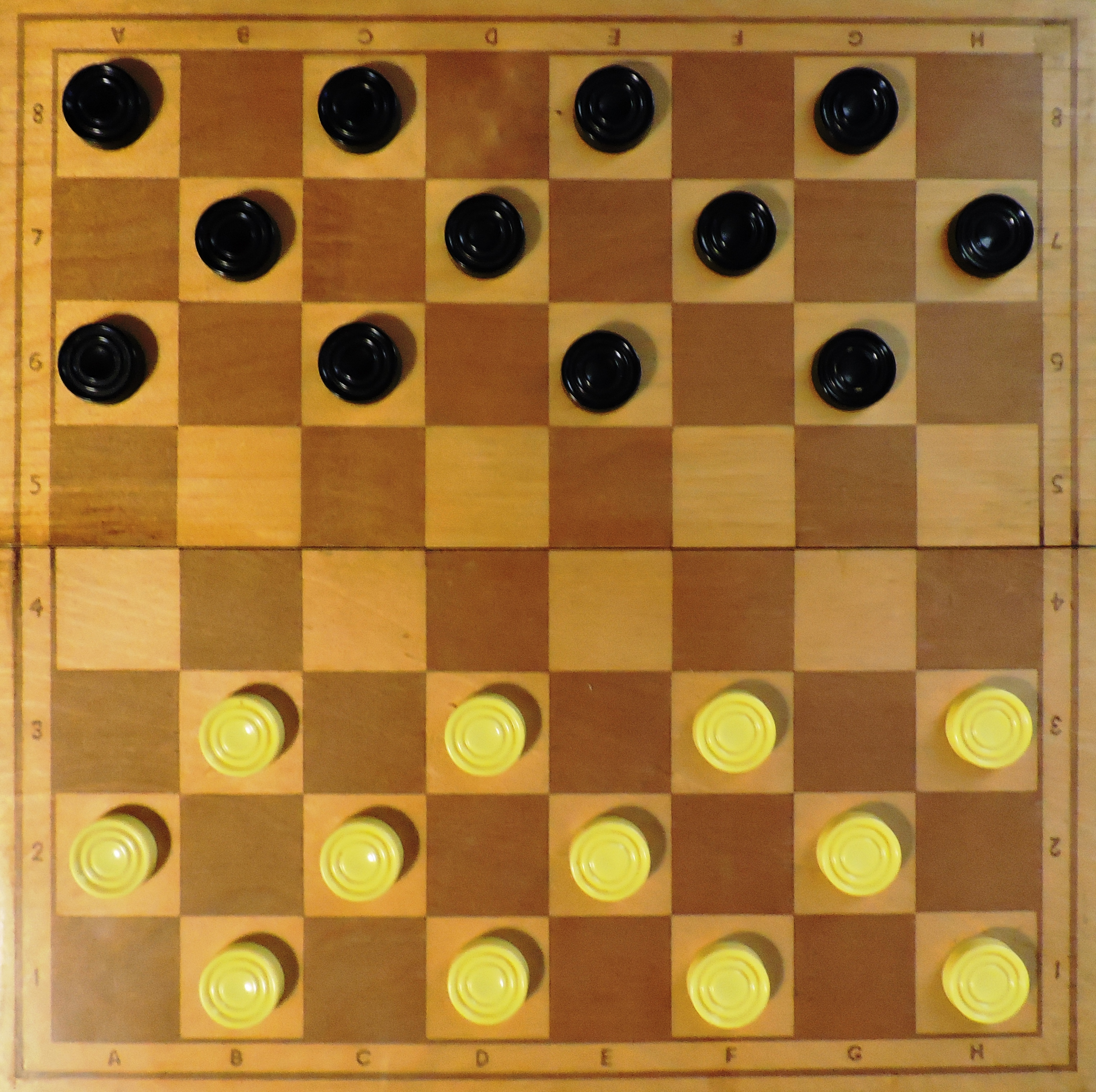 На Ямайке в пул чекерс играют по белым полям